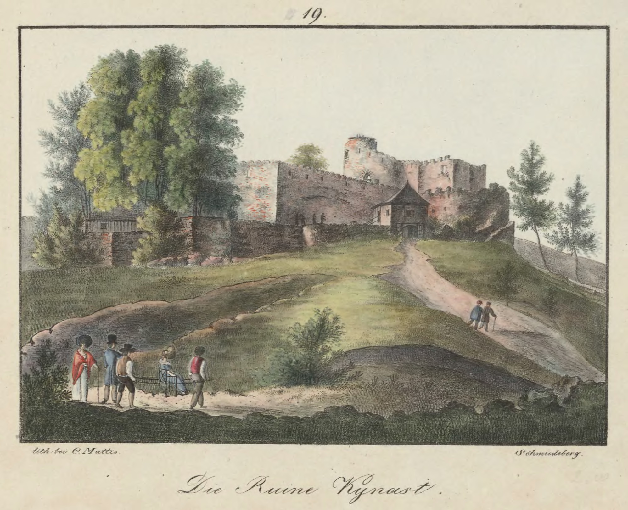 Die Ruine Kynast von Carl Theodor Mattis, 110 x 158 mm